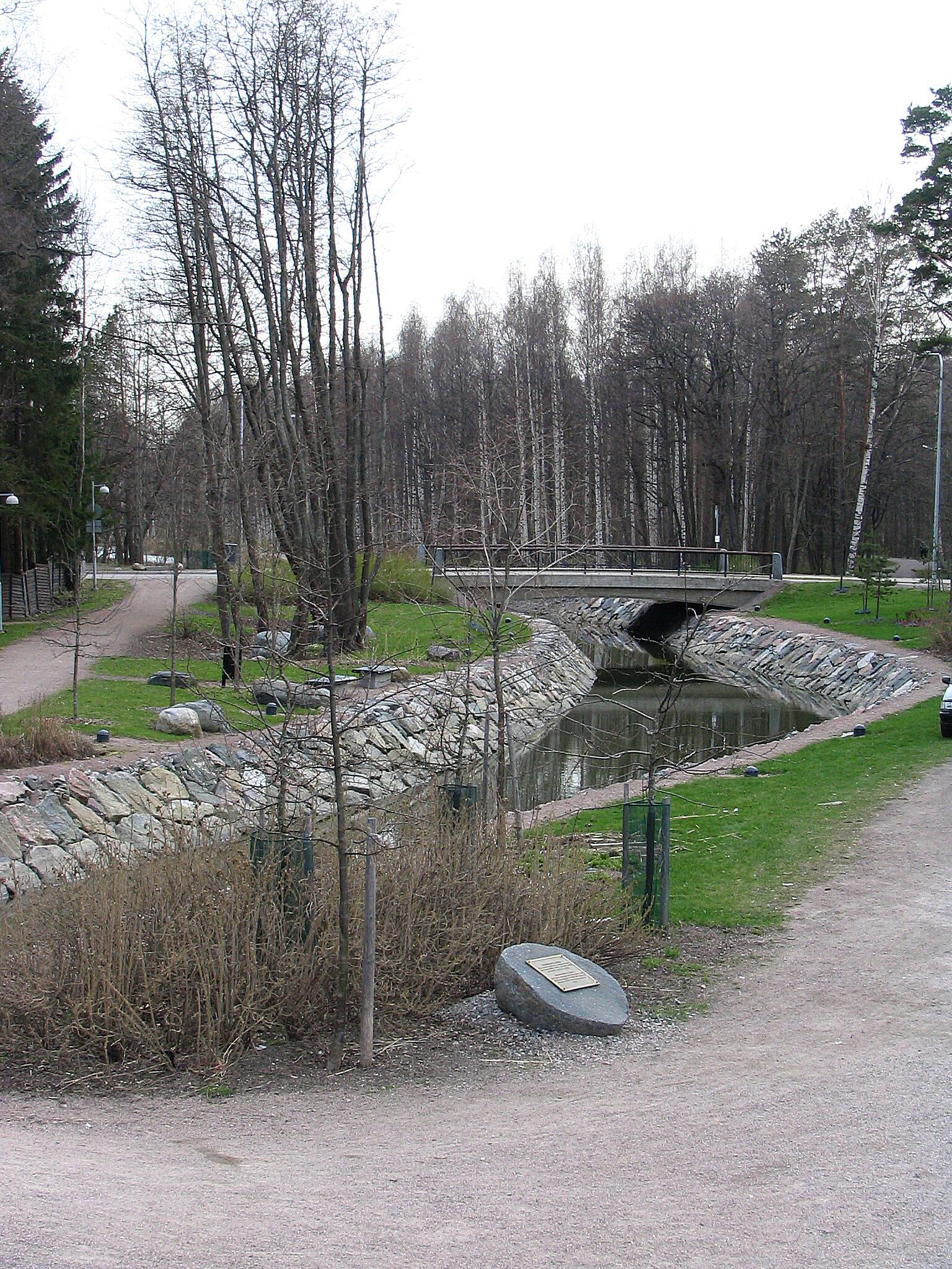 Kuva Tammisalon kanavasta Helsingin Roihuvuoressa.